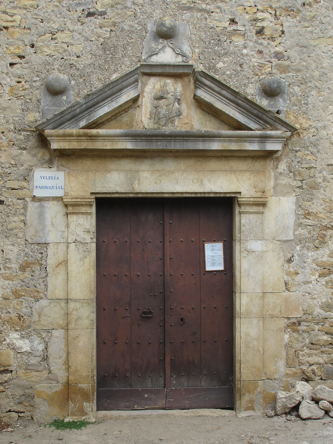 Monestir de Sant Pau de Fontclara (Girona, Catalunya, Espanya) - Porta principal